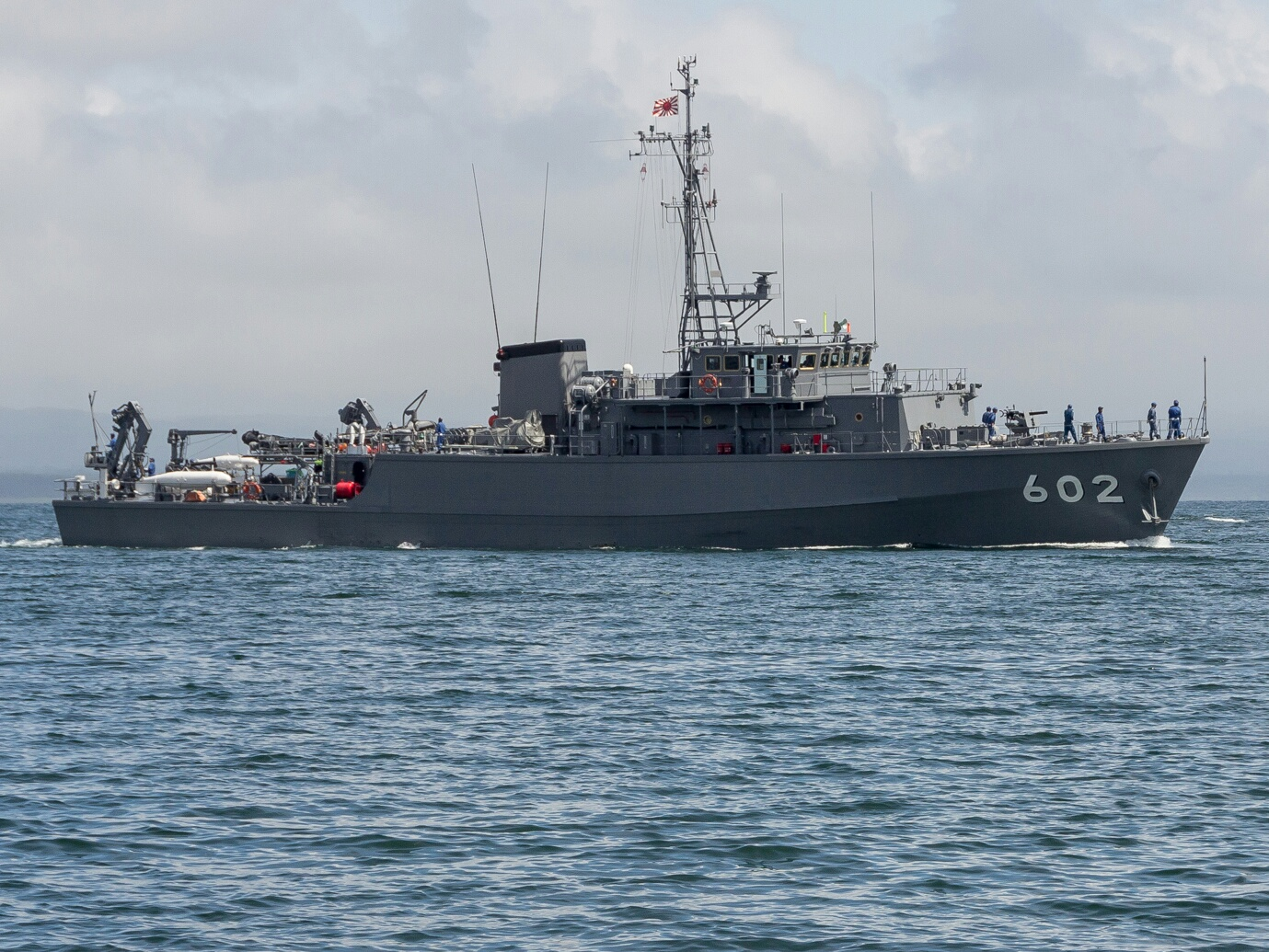 陸奥湾内を大湊基地に向かう｢やくしま｣